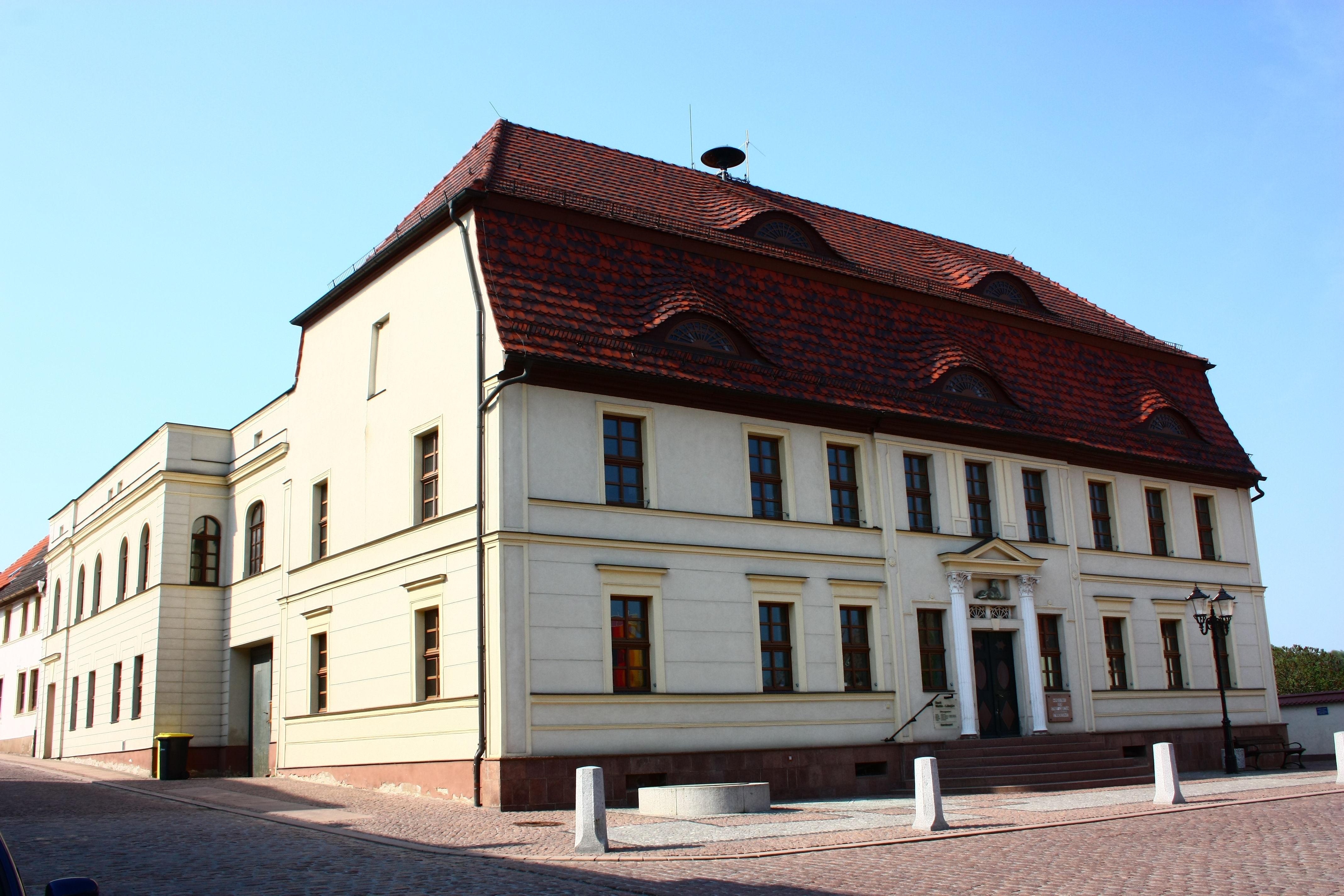 das neue Rathaus in Löbejün